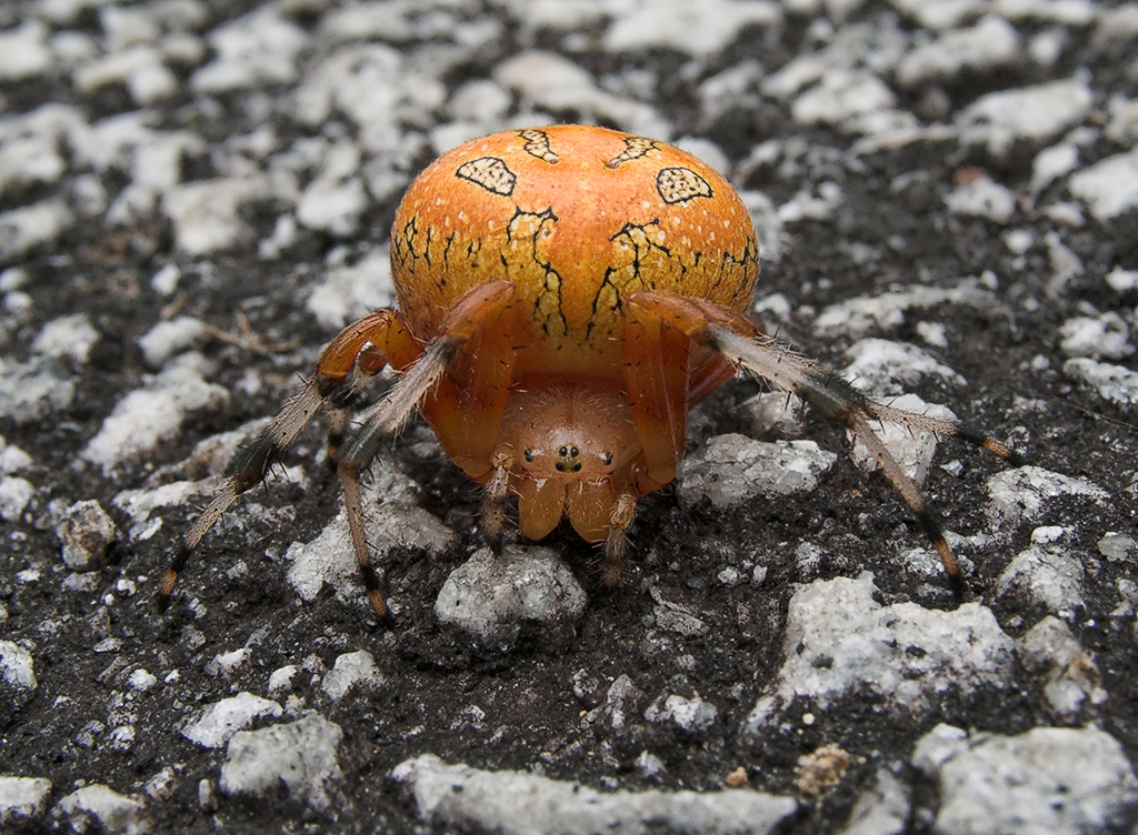 Araneus marmoreus - Marbled Orb Weaver